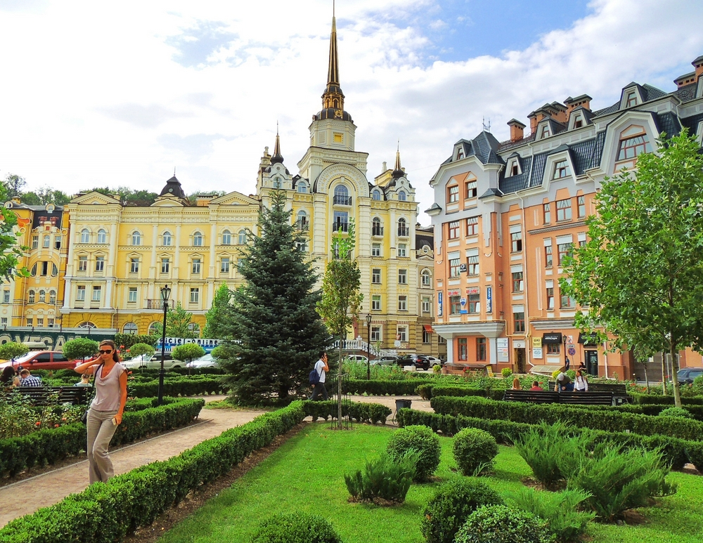 Kyiv ua